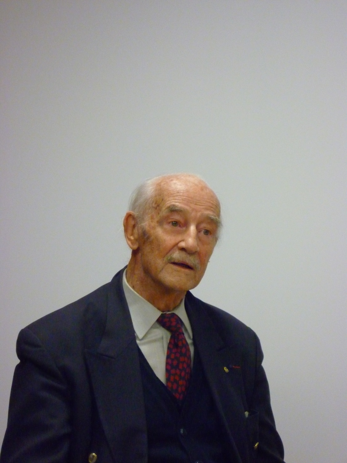 Gilbert Lelord - Tours